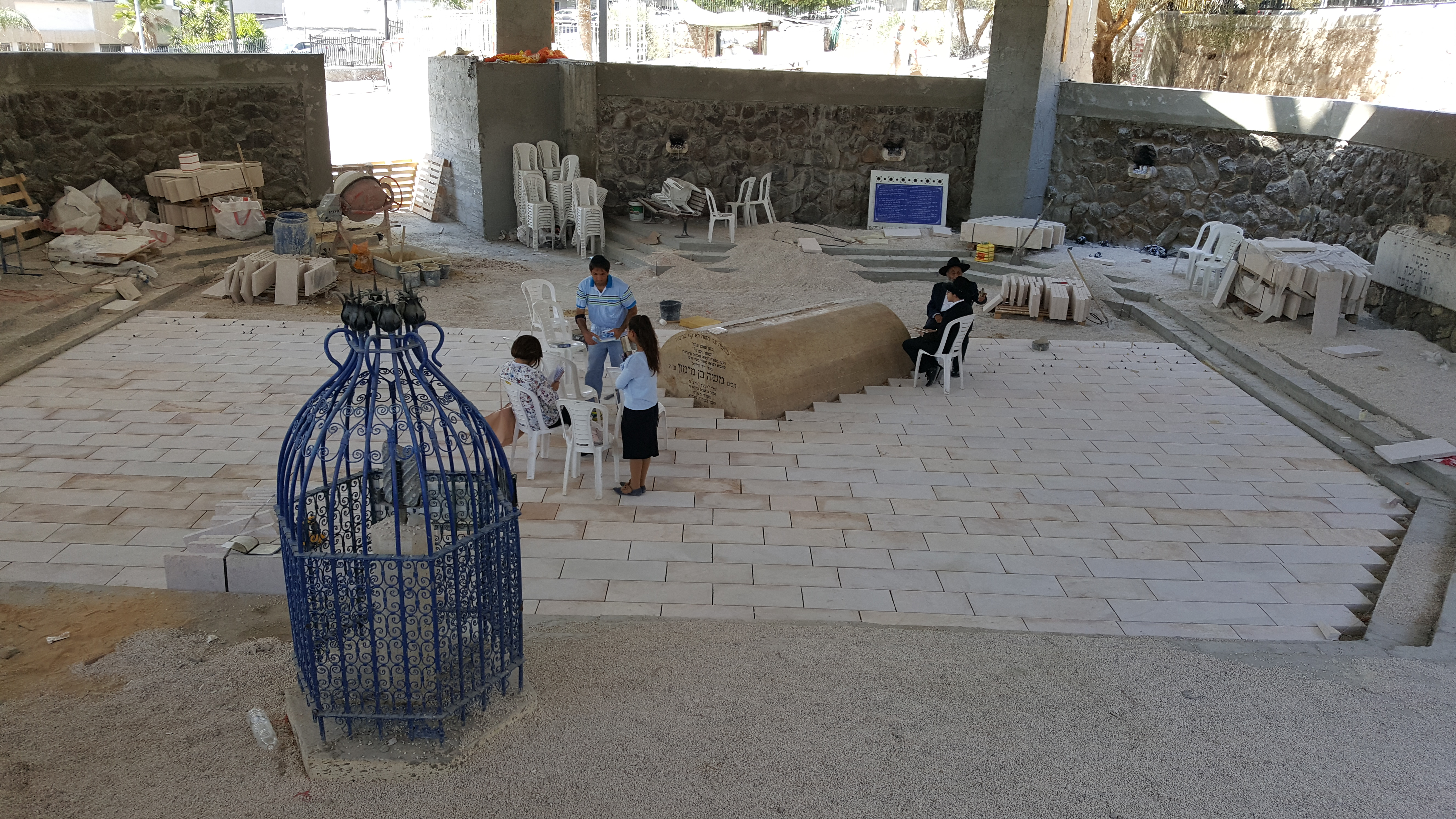 by ovedc - Elef Millim - Maimonides Heritage Center